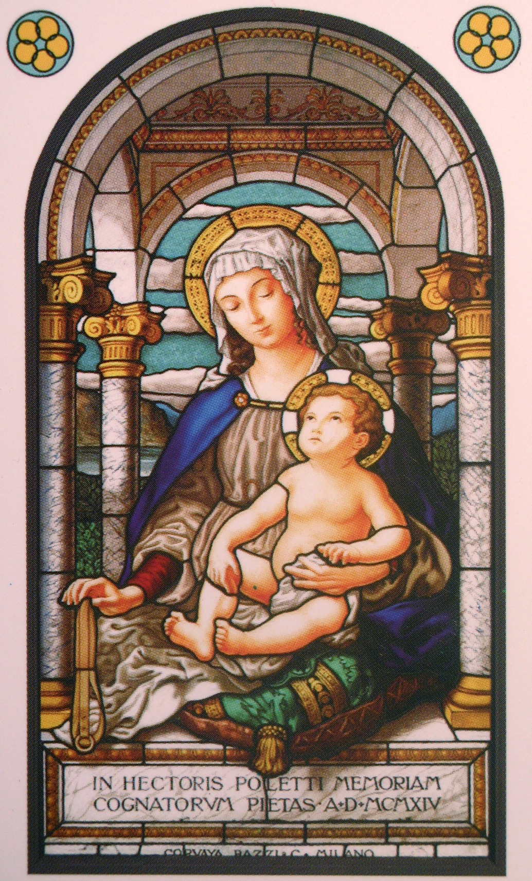 Riproduzione della Madonna della Cintura di Bellagio (1914)